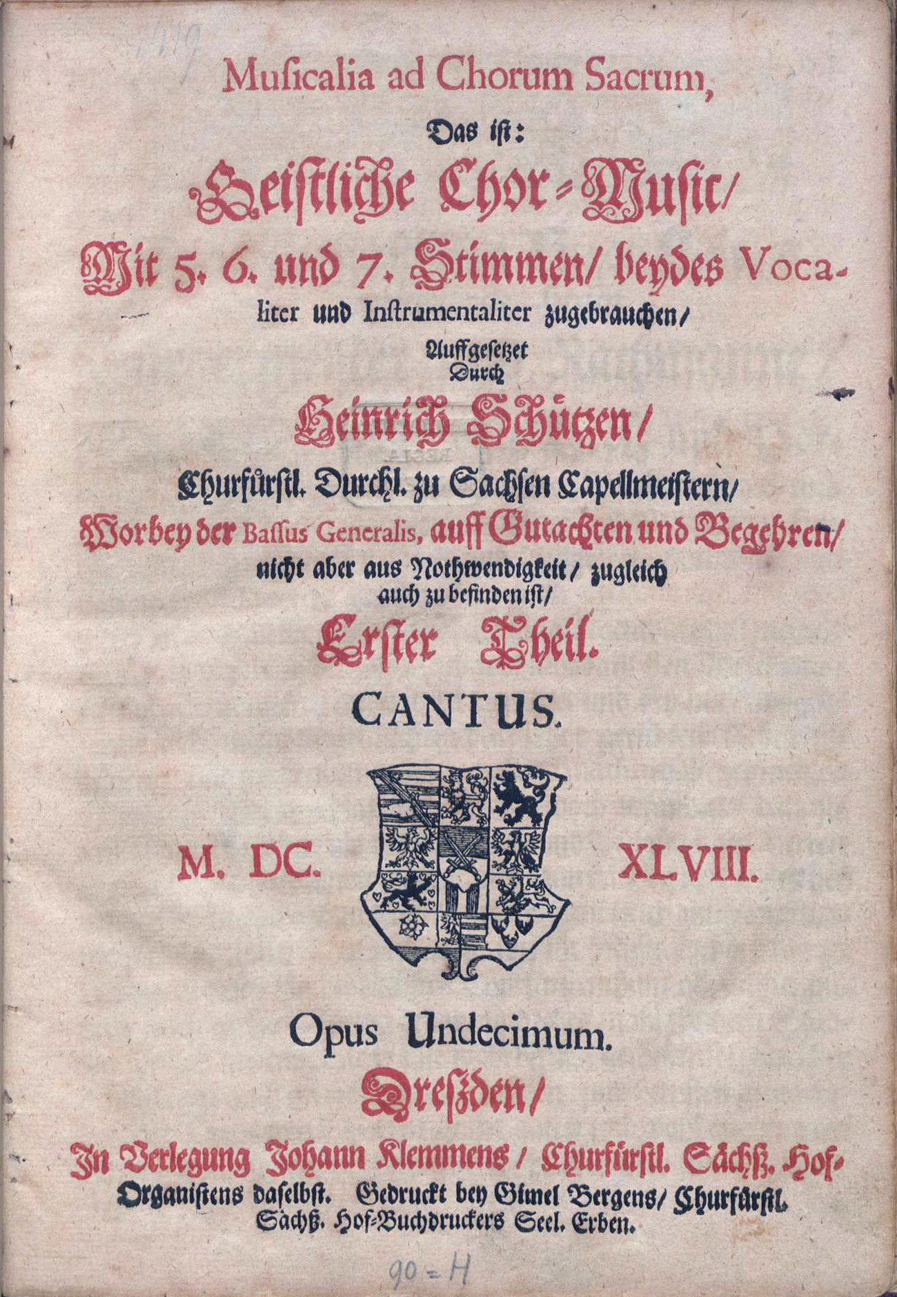 Titelblatt der Geistlichen Chor-Musik (Cantus) von Heinrich Schütz, 1648